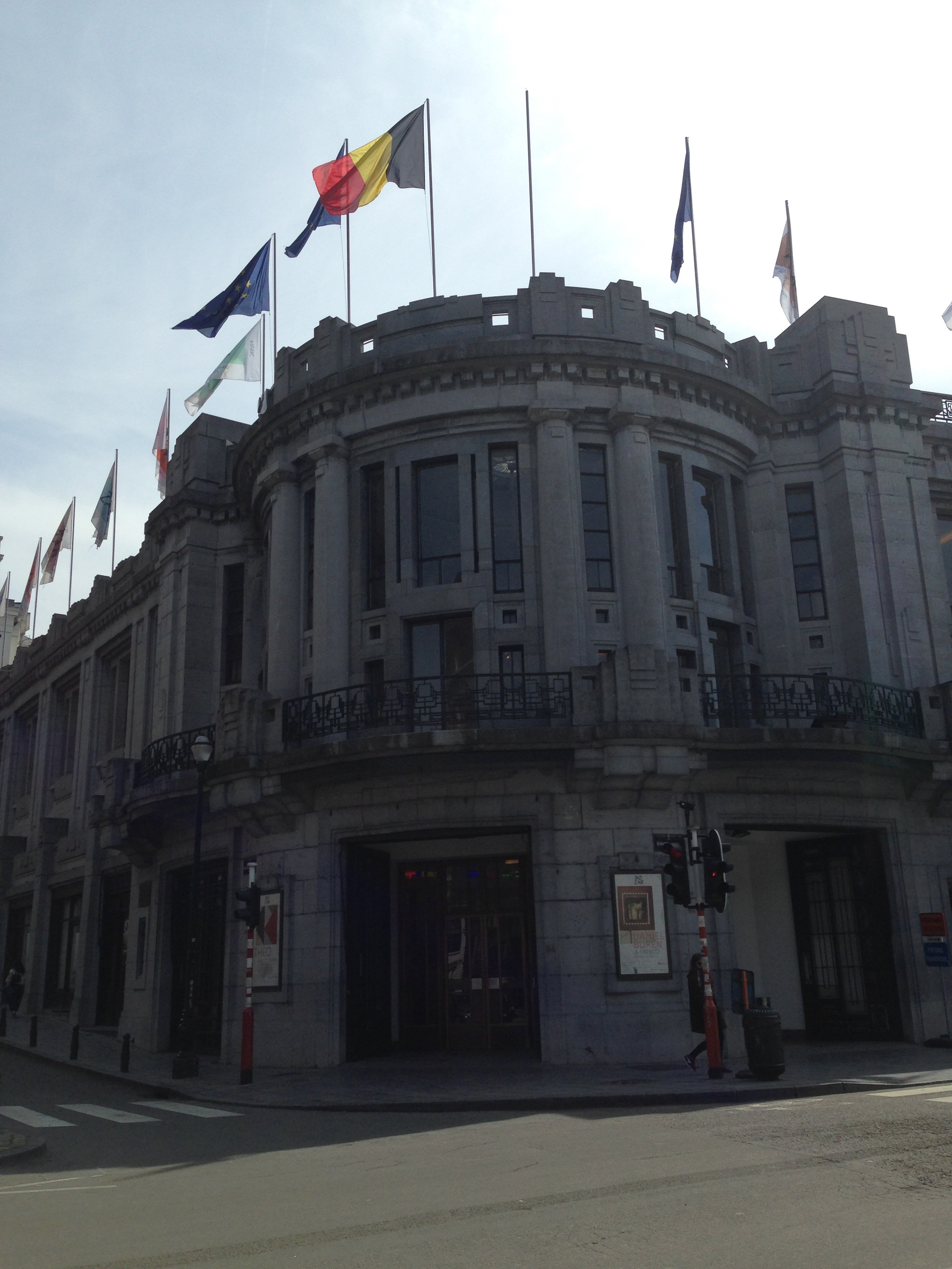 Bozar